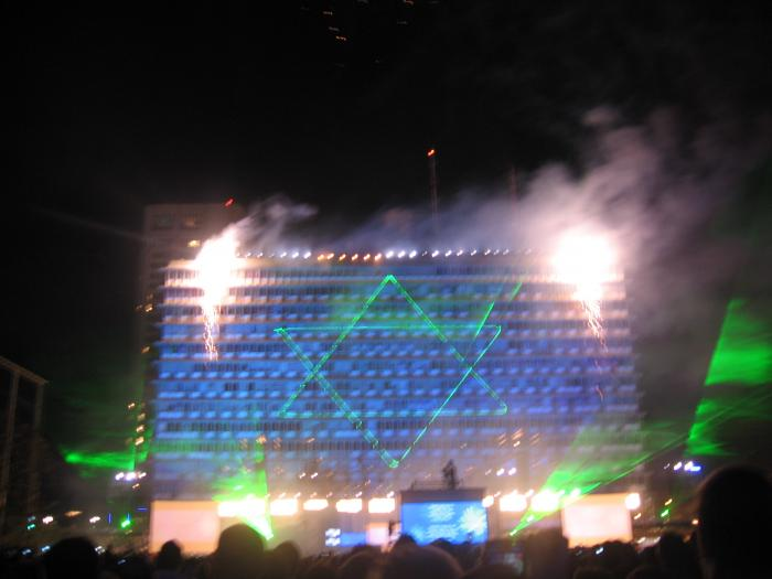 חגיגות ערב יום העצמאות בתל אביב, כיכר רבין. מופע מיוחד על קיר בנין עיריית תל-אביב ובו תמונות מההסטוריה של המדינה. זיקוקים מרהיבים. הפקה מדהימה ביופיה!